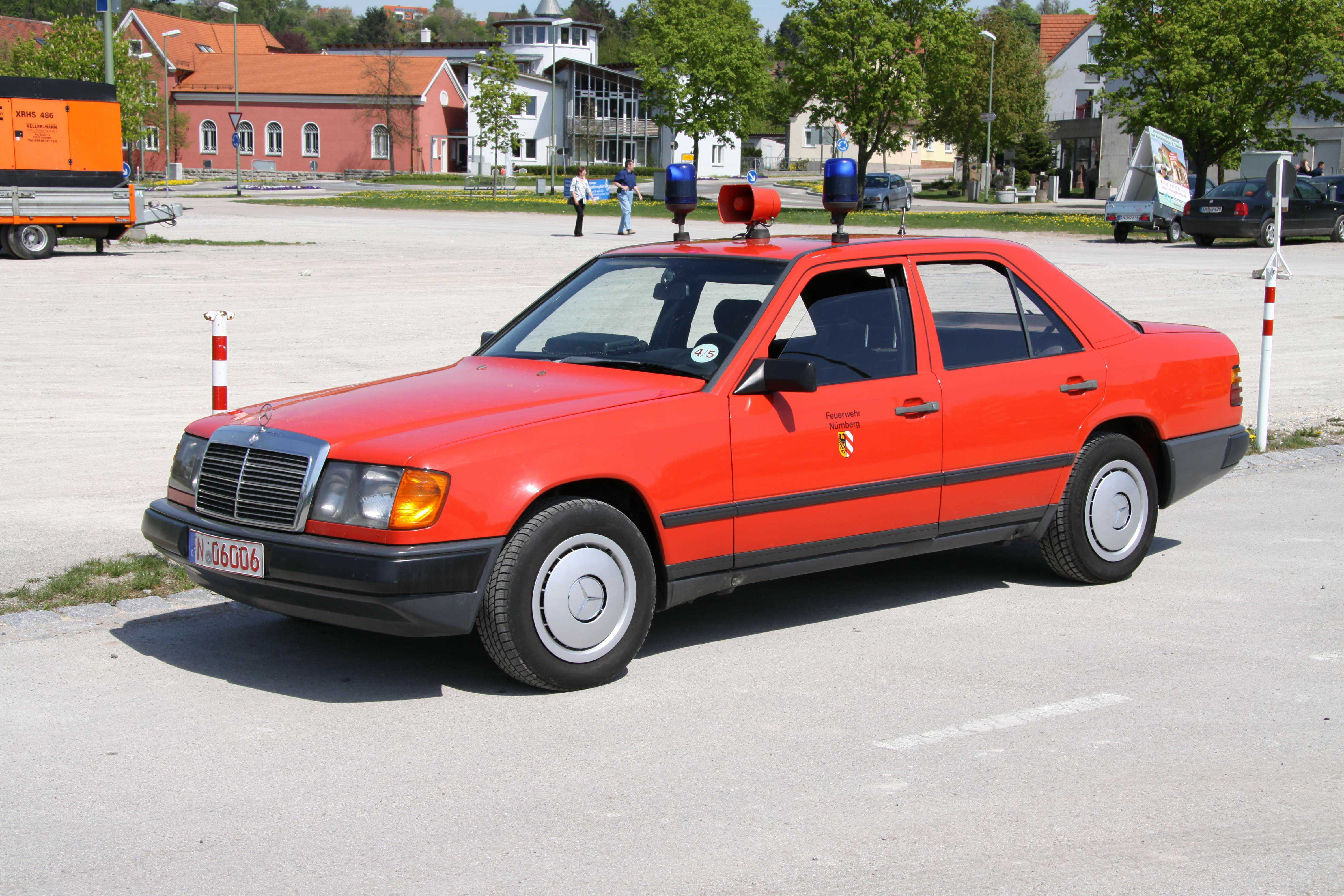 Dienstwagen der Berufsfeuerwehr Nürnberg (Ehemals DW 1)